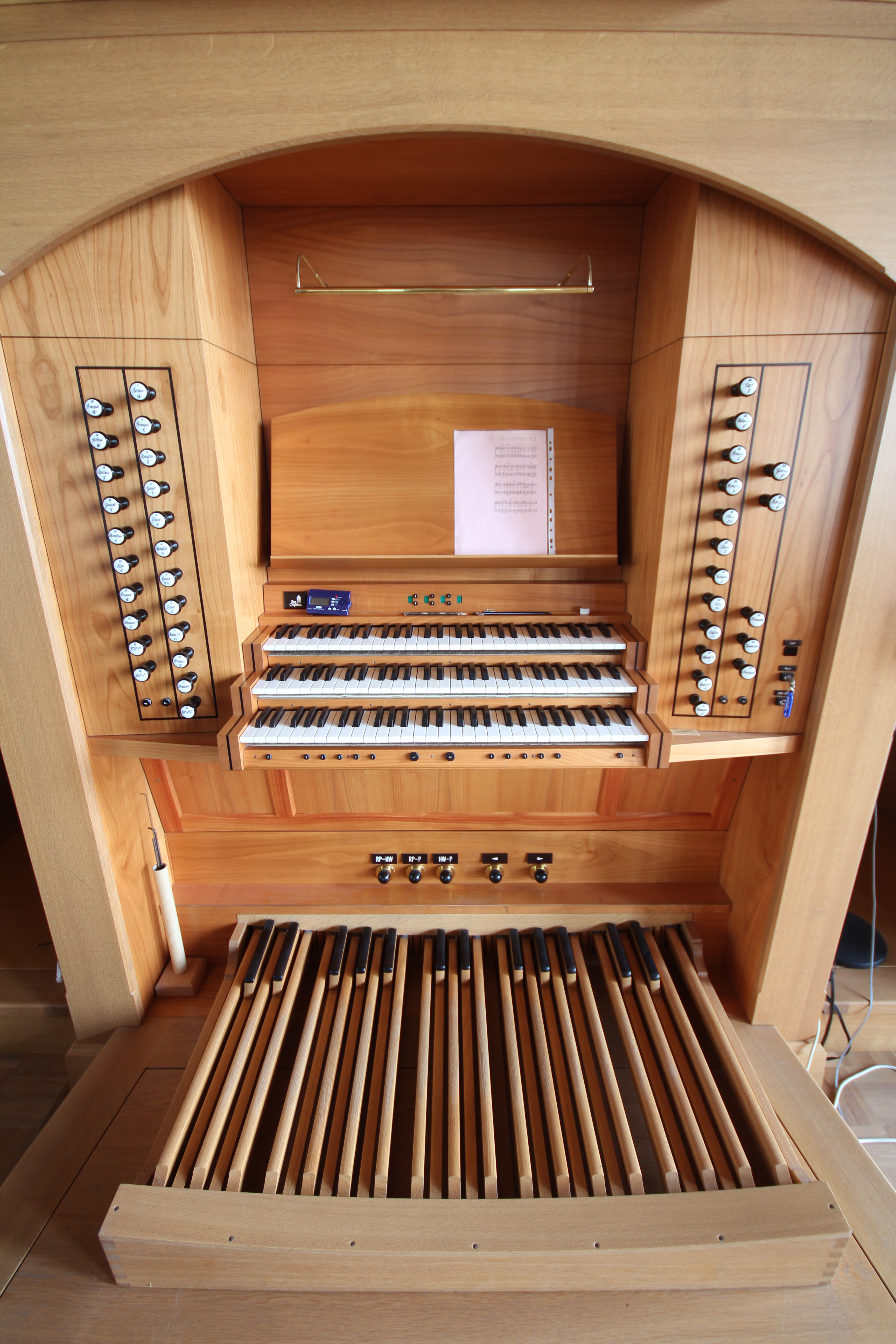 Spieltisch der Hey-Orgel der evangelischen Christuskirche zu Oberhausen-Alt Oberhausen.